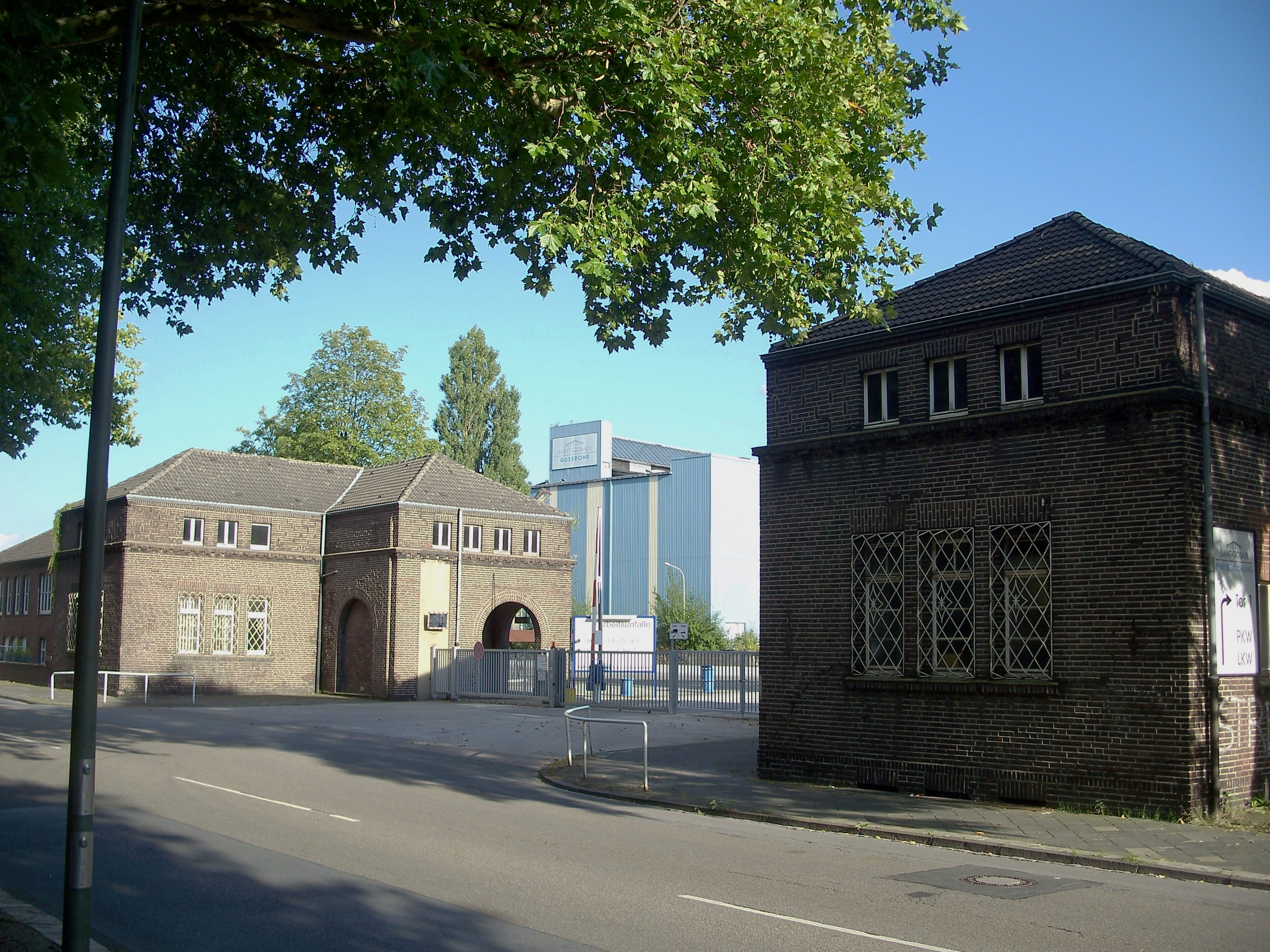 Torhaus 1 des Schalker Verein in Gelsenkirchen, heute Einfahr Saint Gobain